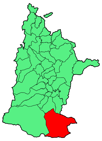 Urdatxen kokapena zuberoan